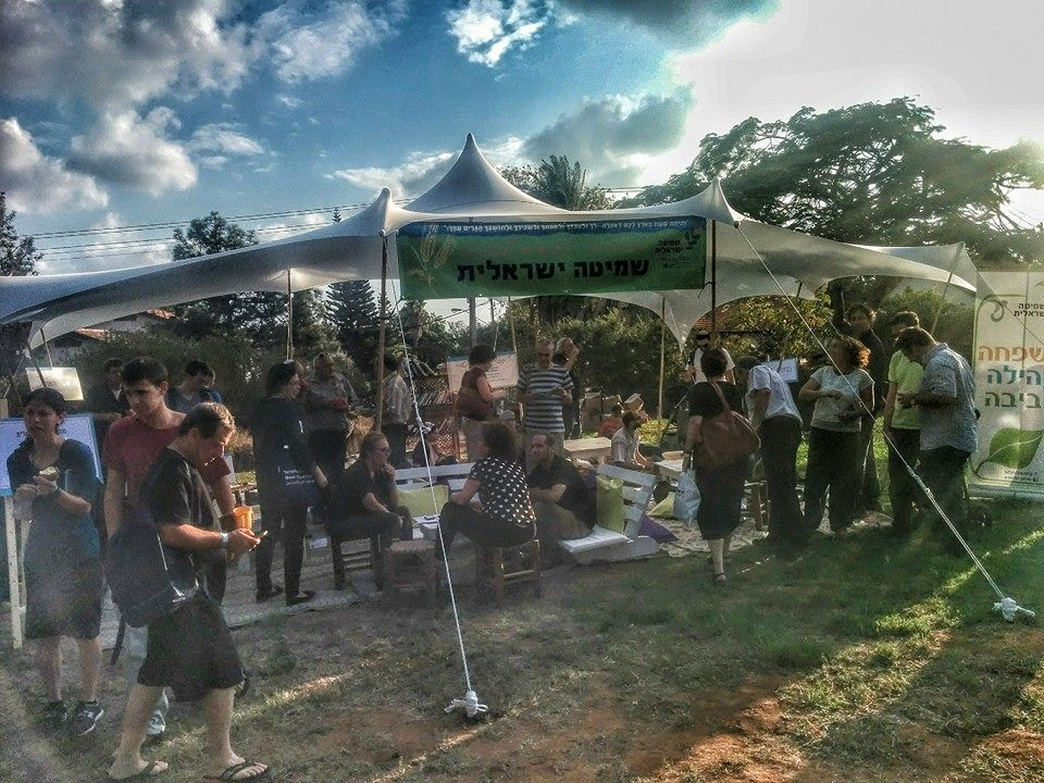 אוהל שמיטה ישראלית בפסטיבל הקהל